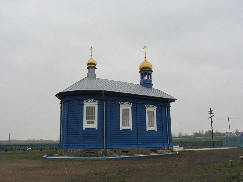 Пацавічы. Царква Раства Багародзіцы